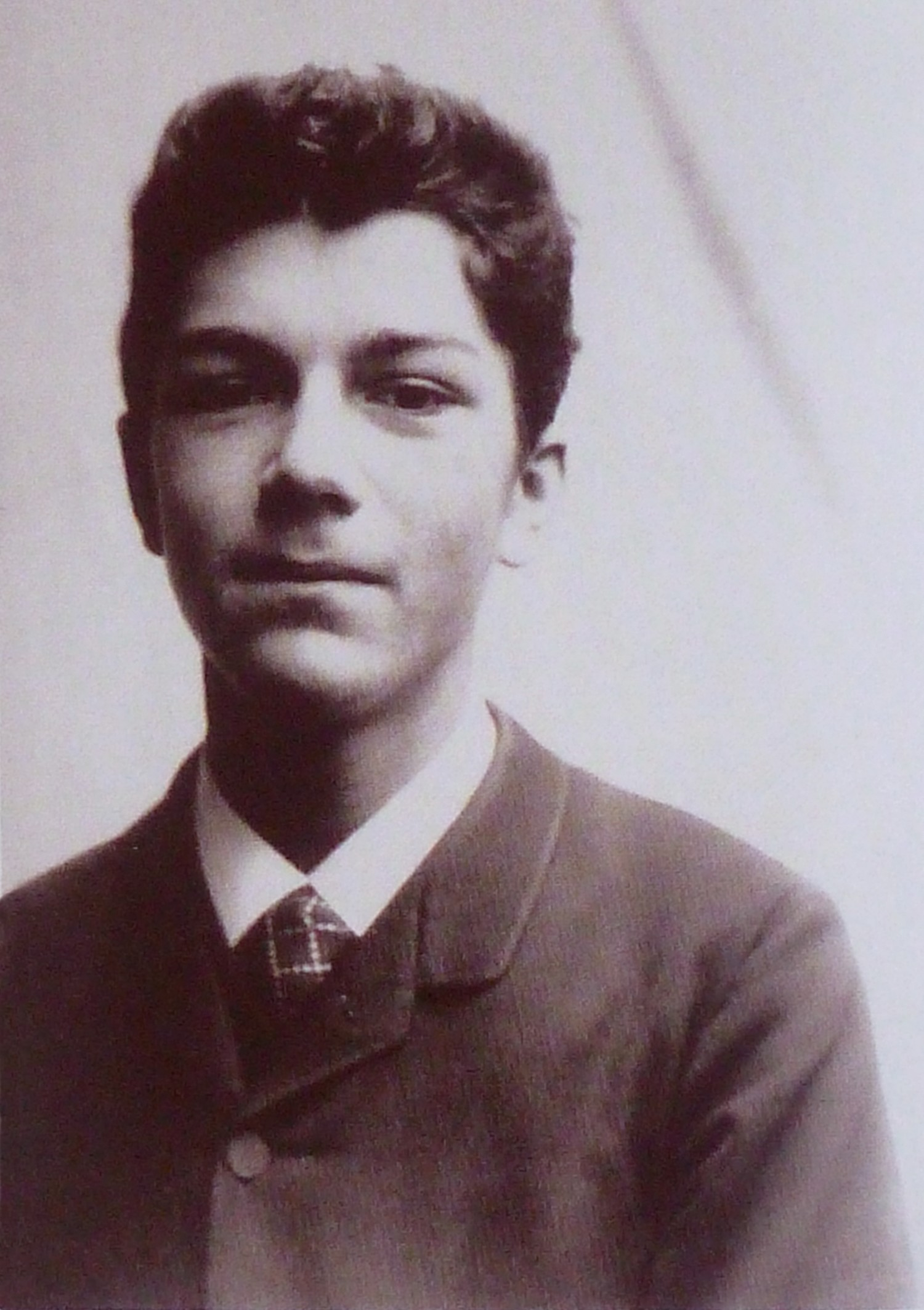 Daniel Halévy (1872-1962), vers 1885, photographe inconnu.